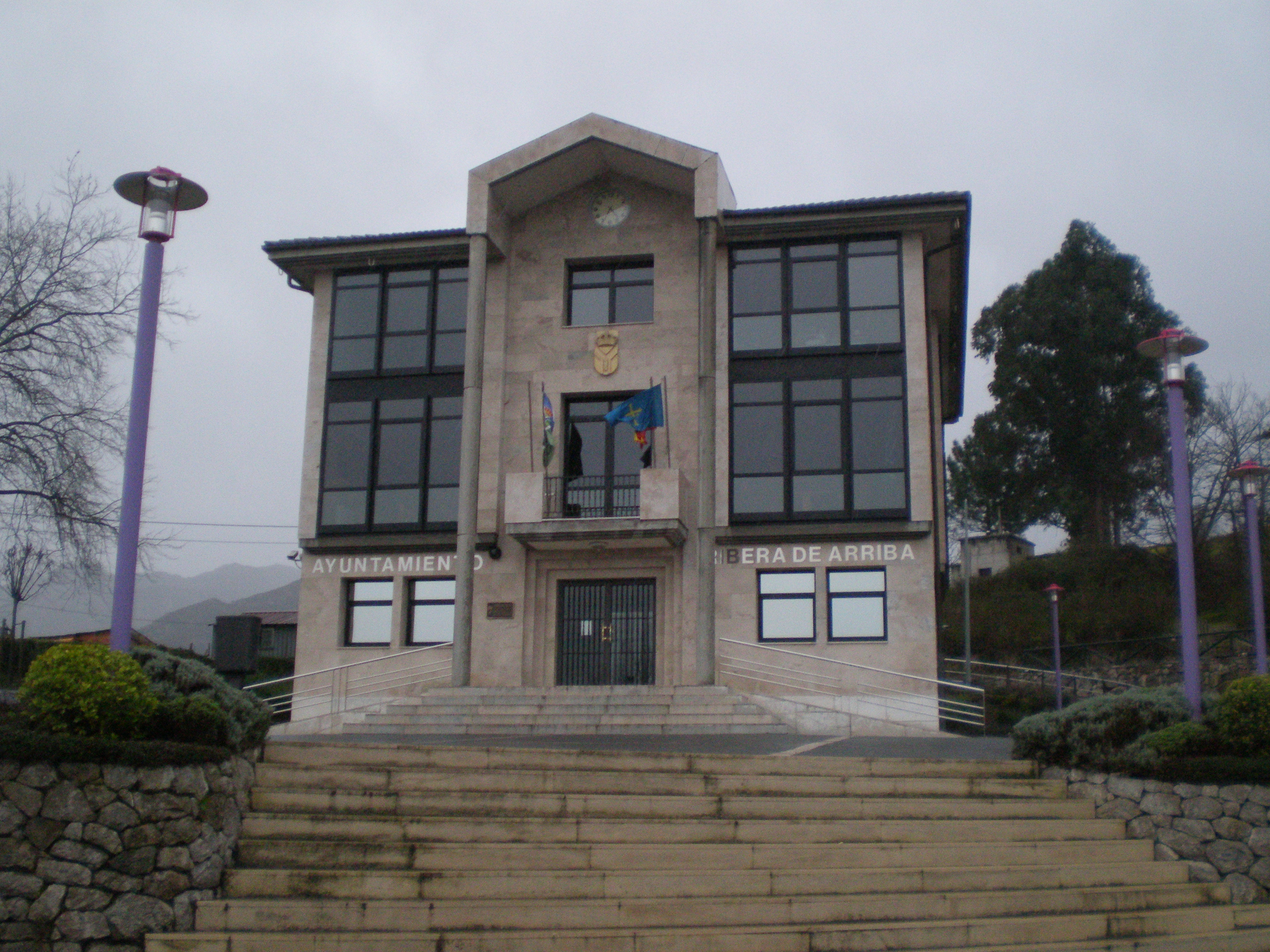 Casa Conceyu de La Ribera